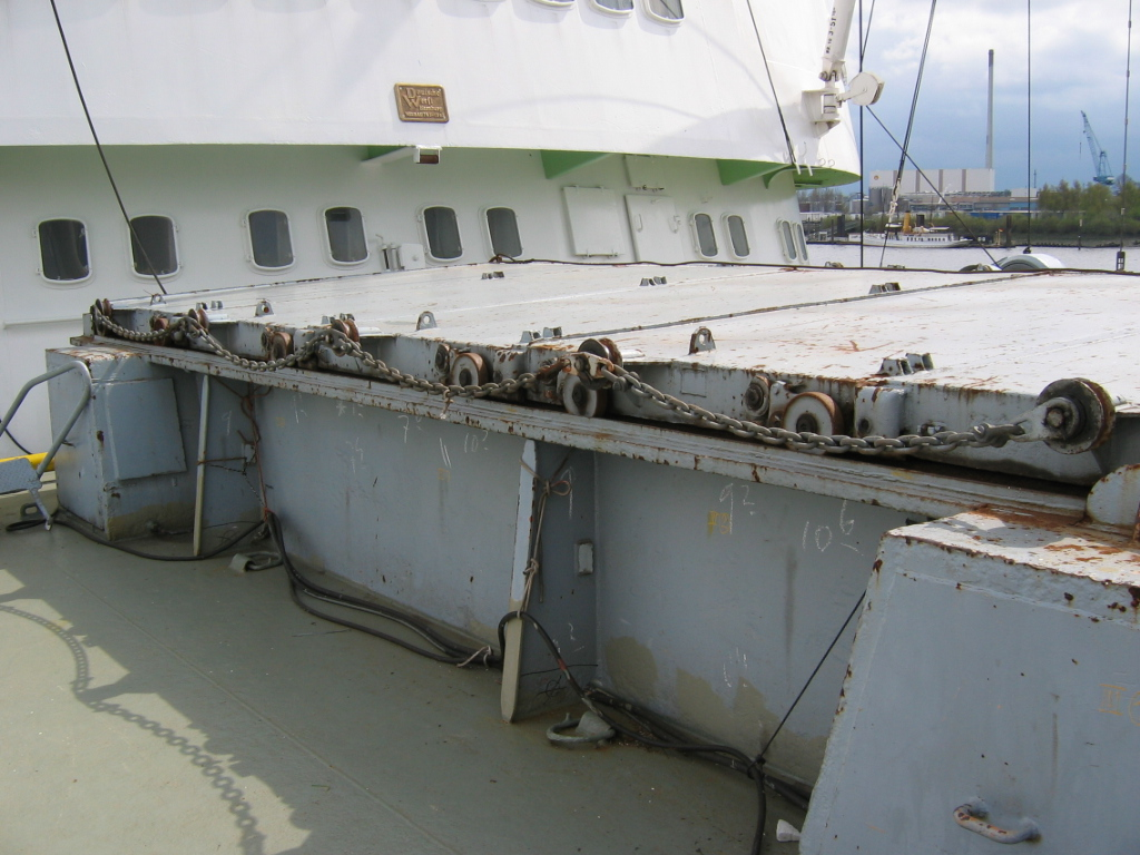 Pokrywa luku ładowni MS Cap San Diego - Hamburg IMO Number: 5060794 MMSI Number: 211855000 Callsign: DNAI Length: 160 m Beam: 20 m